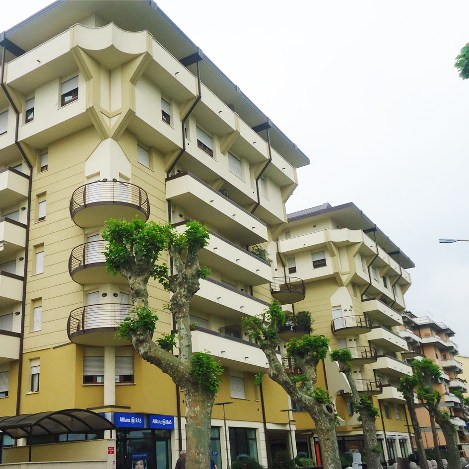 Pescia complesso residenziale sul fiume Pescia